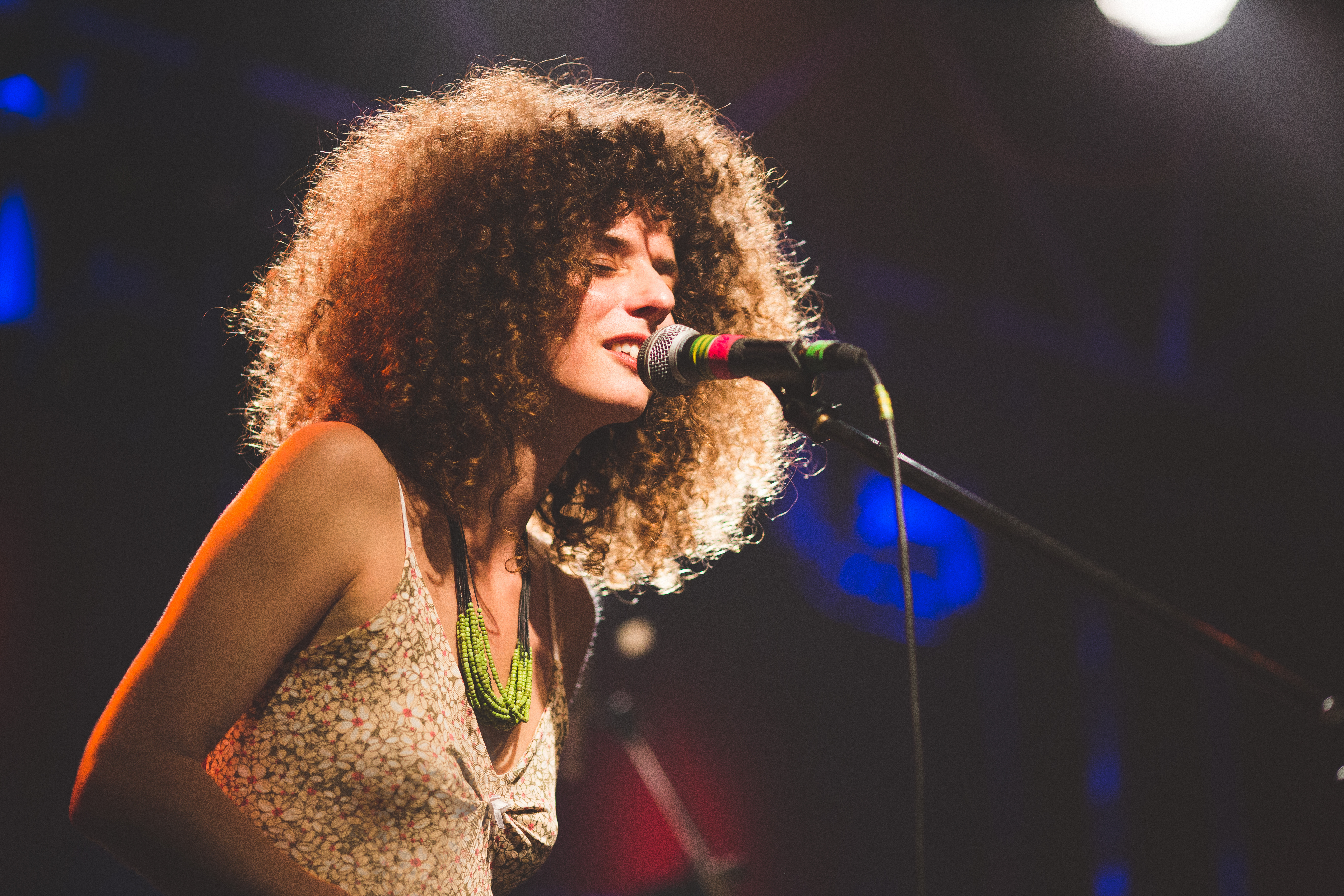 צילום: זהר ראלט